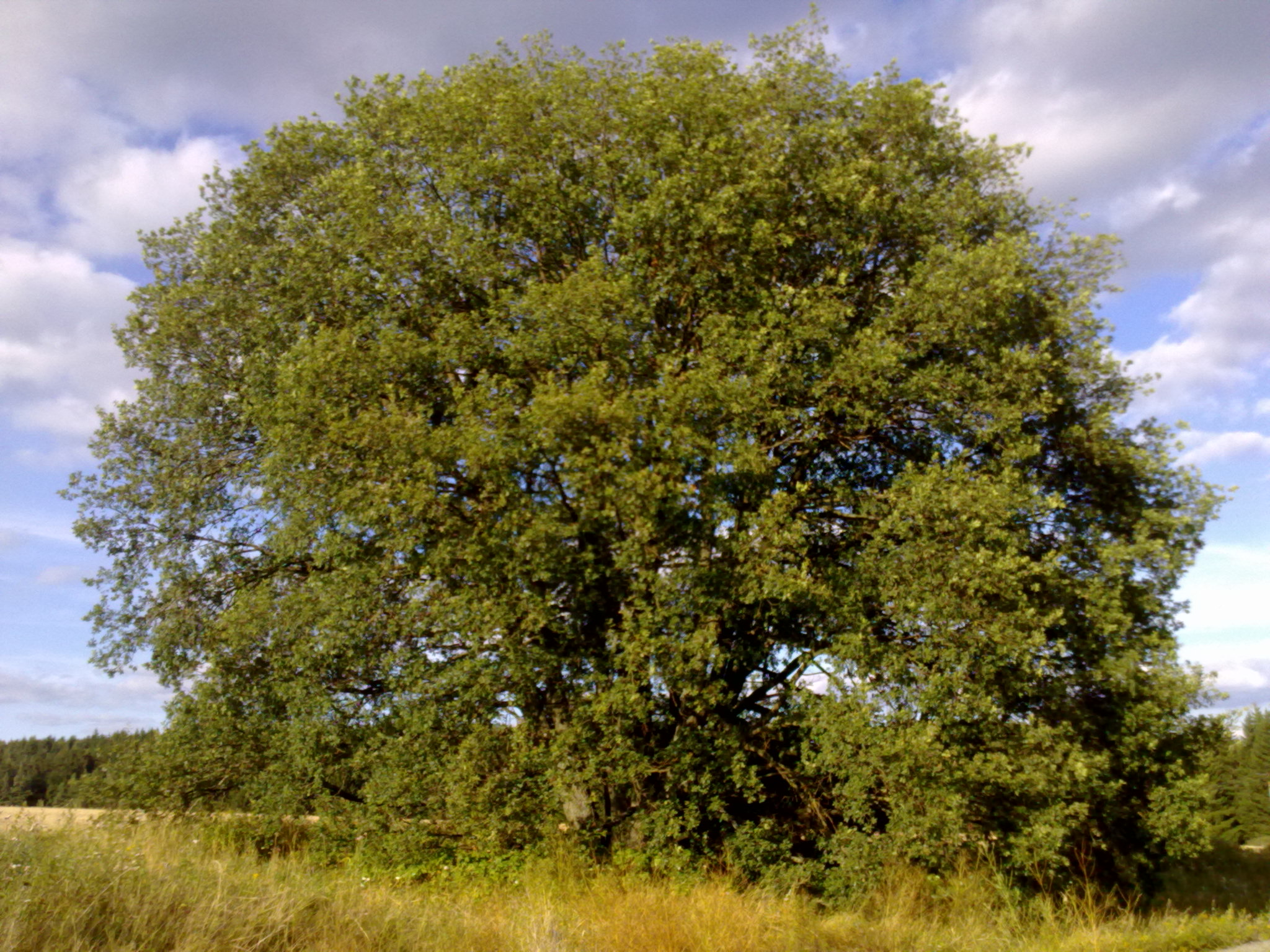 Dub U oříšku. Poblíž obce Tři Sekery. Rok 2012.